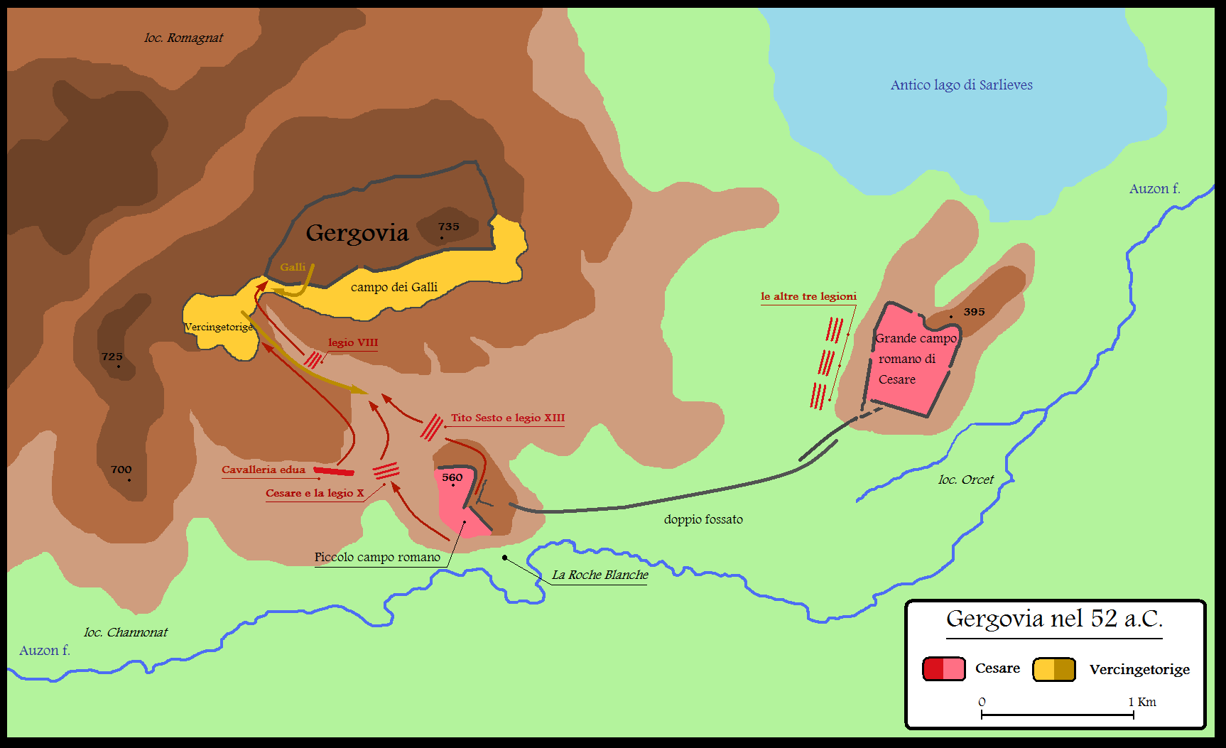 La battaglia di Gergovia del 52 a.C. (II fase)